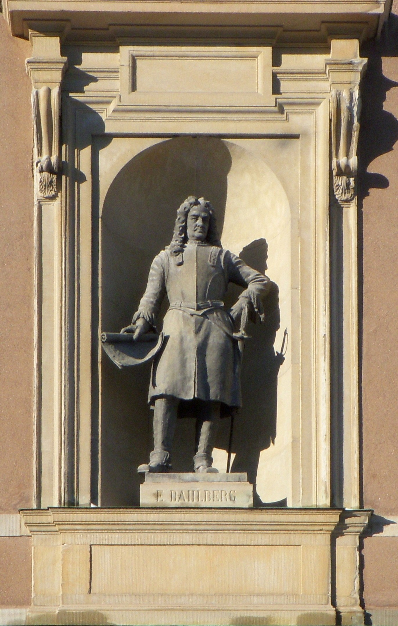 Stockholms slott, skulptur på södra fasaden: Dahlberg